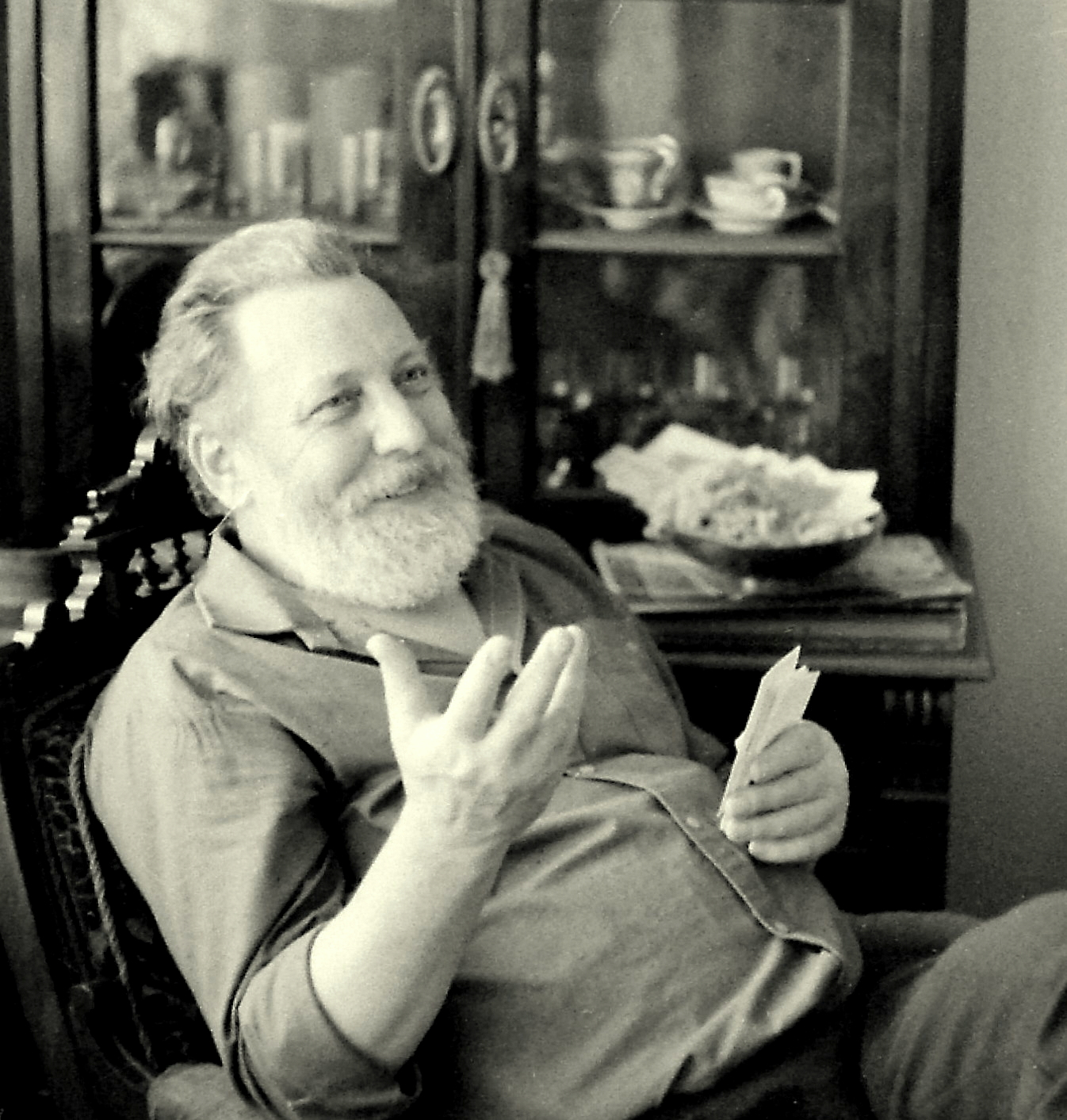 Fotoportrait von Kurt-Hermann Kühn aus dem Jahre 1984